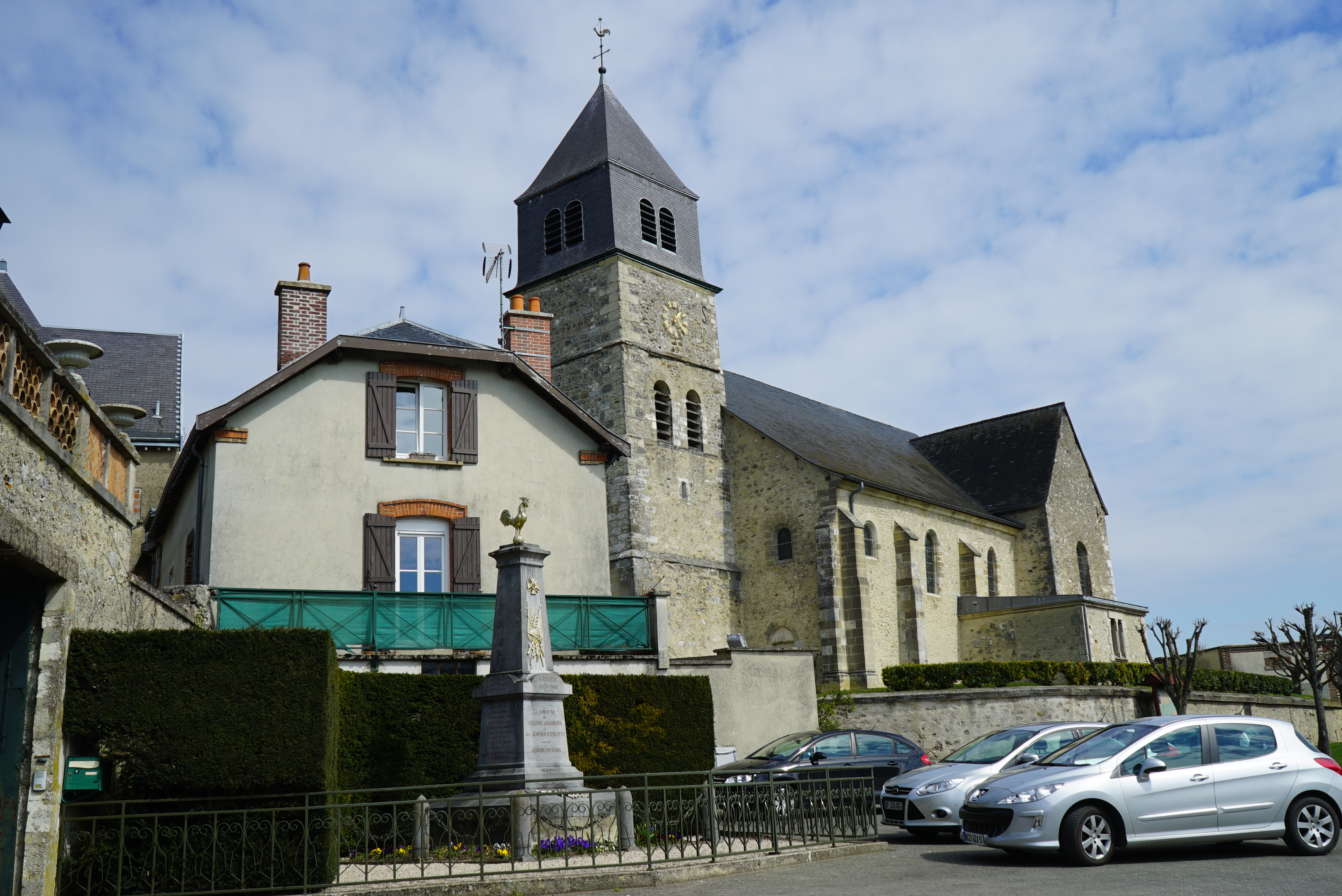 Église Sainte-Agathe de Villers-Allerand et monument aux morts.